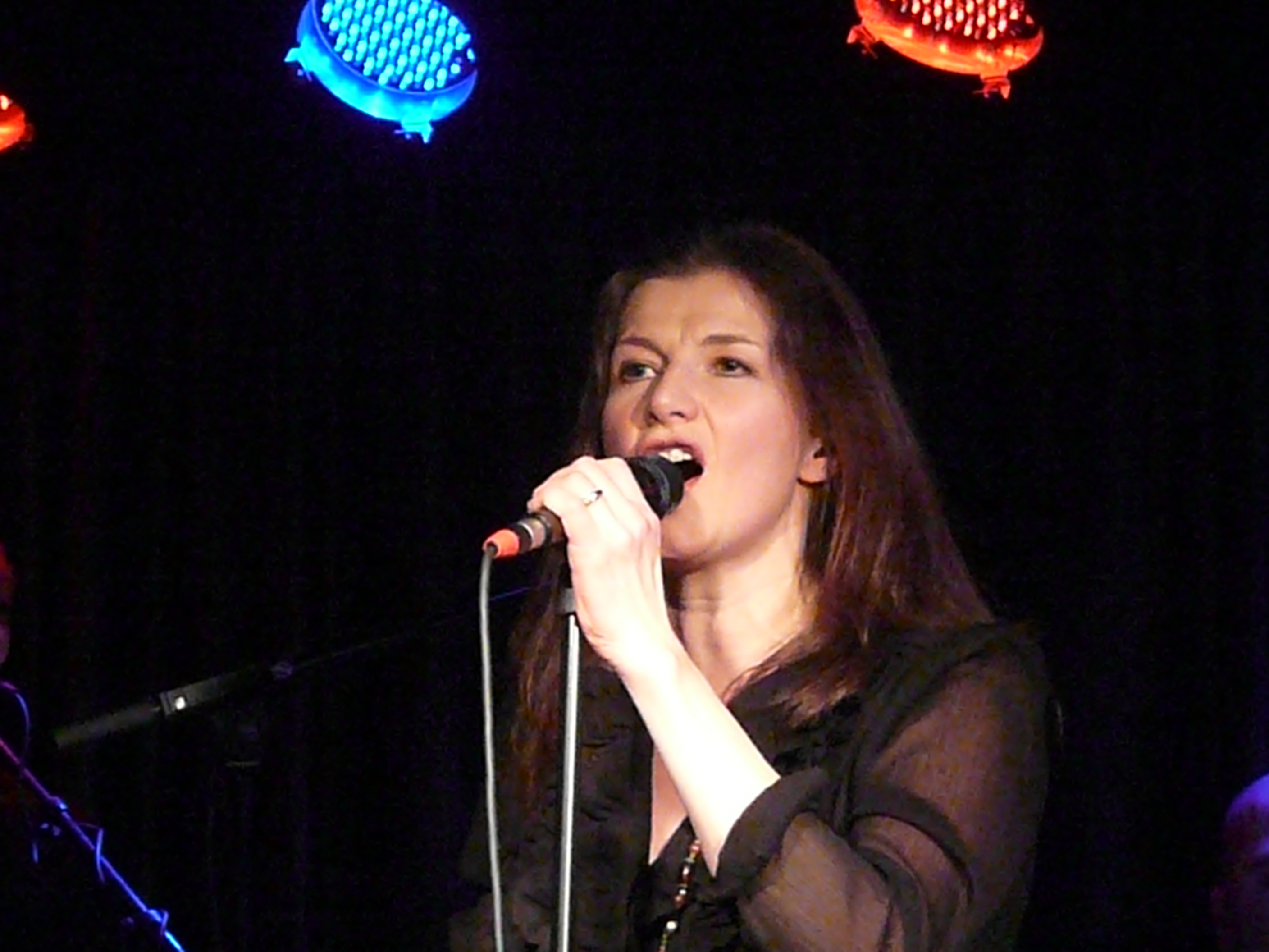 Kaija Kärkinen during her concert in Mikkeli.